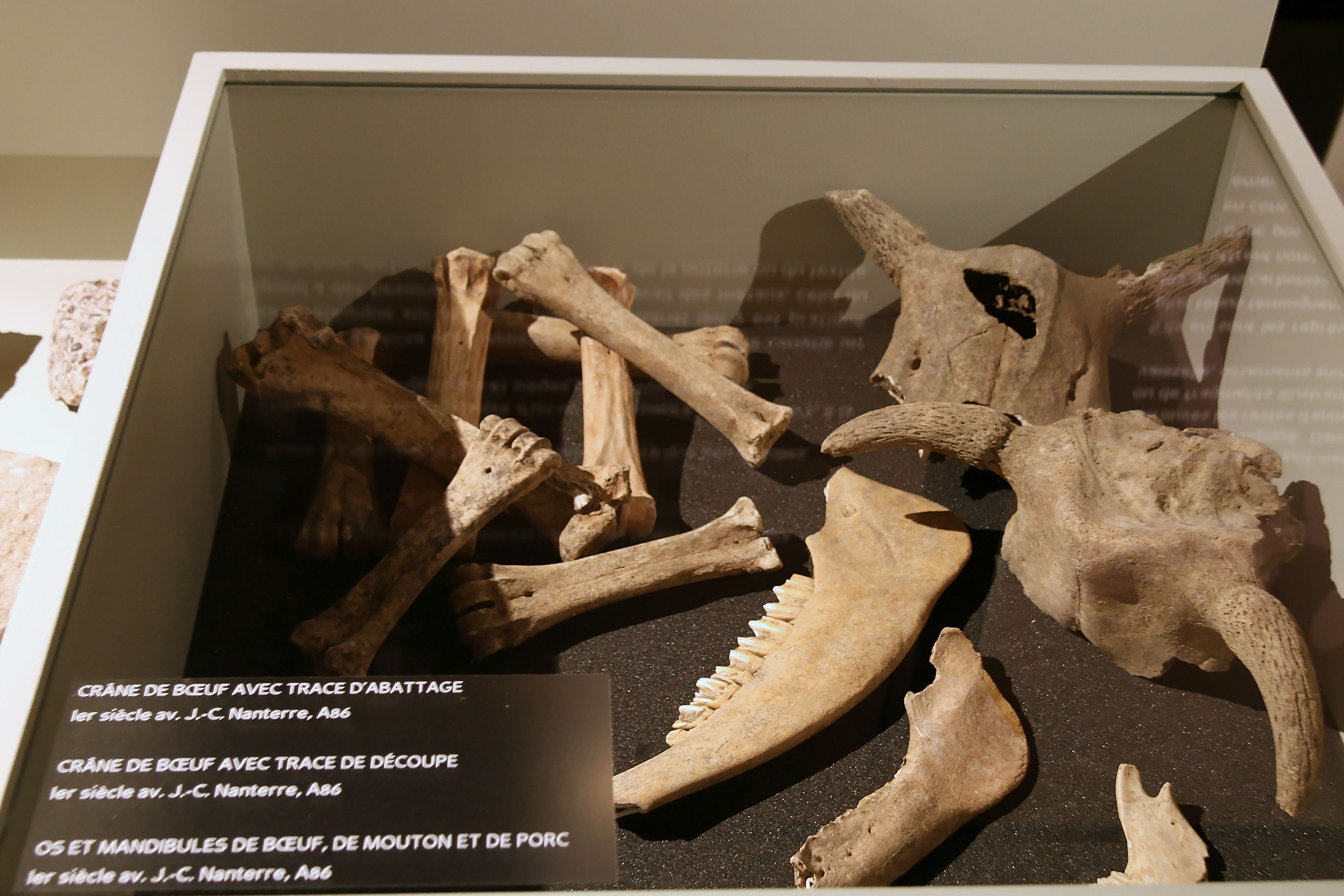 Exposition temporaire des fouilles archéologiques de Nanterre en avril 2008, découverte de Cranes de boeuf avec trace d'abattage et découpe, 1er siècle av JC, A86